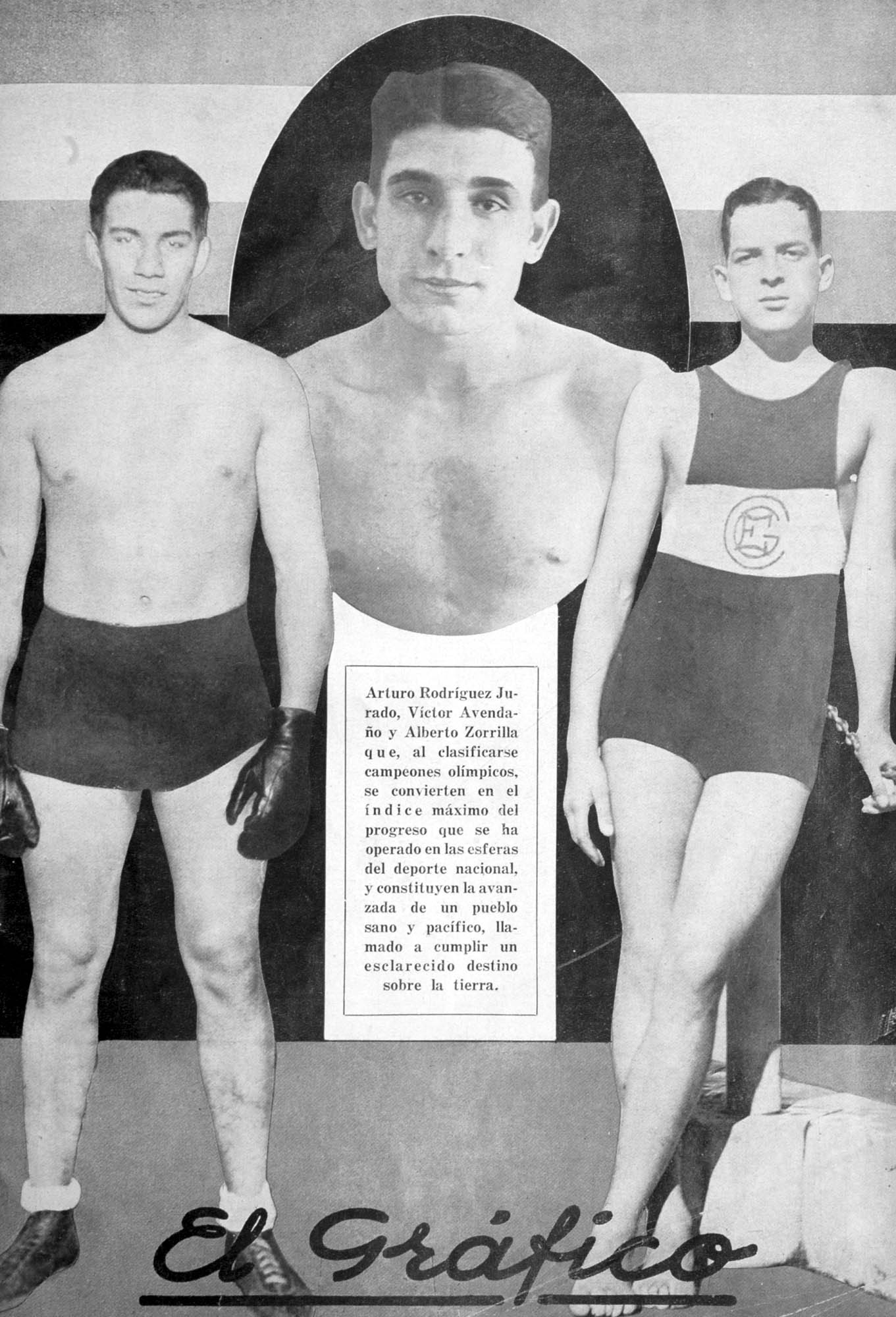 El Grafico del 18 de Agosto de 1928. Edicion 476